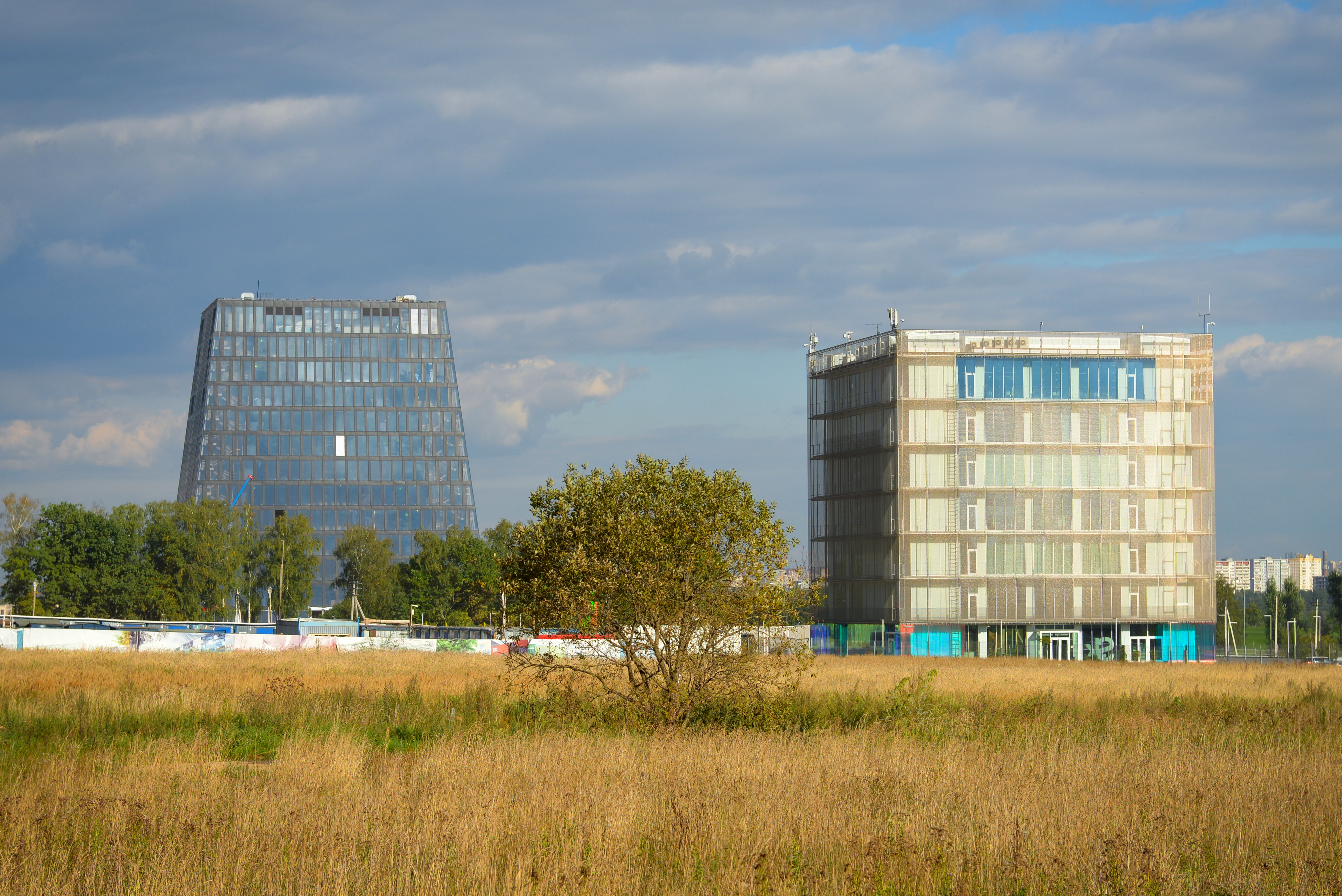 Объекты инновационного центра «Сколково»: «Гиперкуб» и «Матрешка»